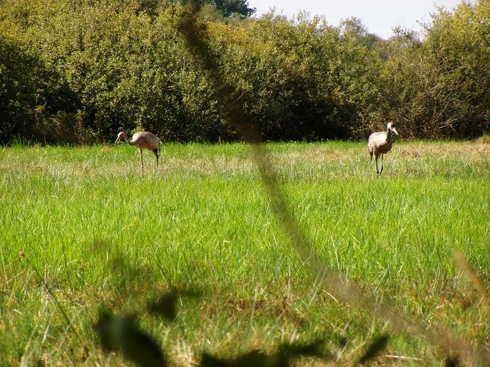 Kraniche (Grus grus), Altvogel mit Bruterfolg im Königsmoor (Teil des NSG „Hahnenknooper Moore“) im Landkreis Cuxhaven, Niedersachsen. Als Brutgebiet ist das gesamte NSG Hahnenknooper Moor anzusehen.